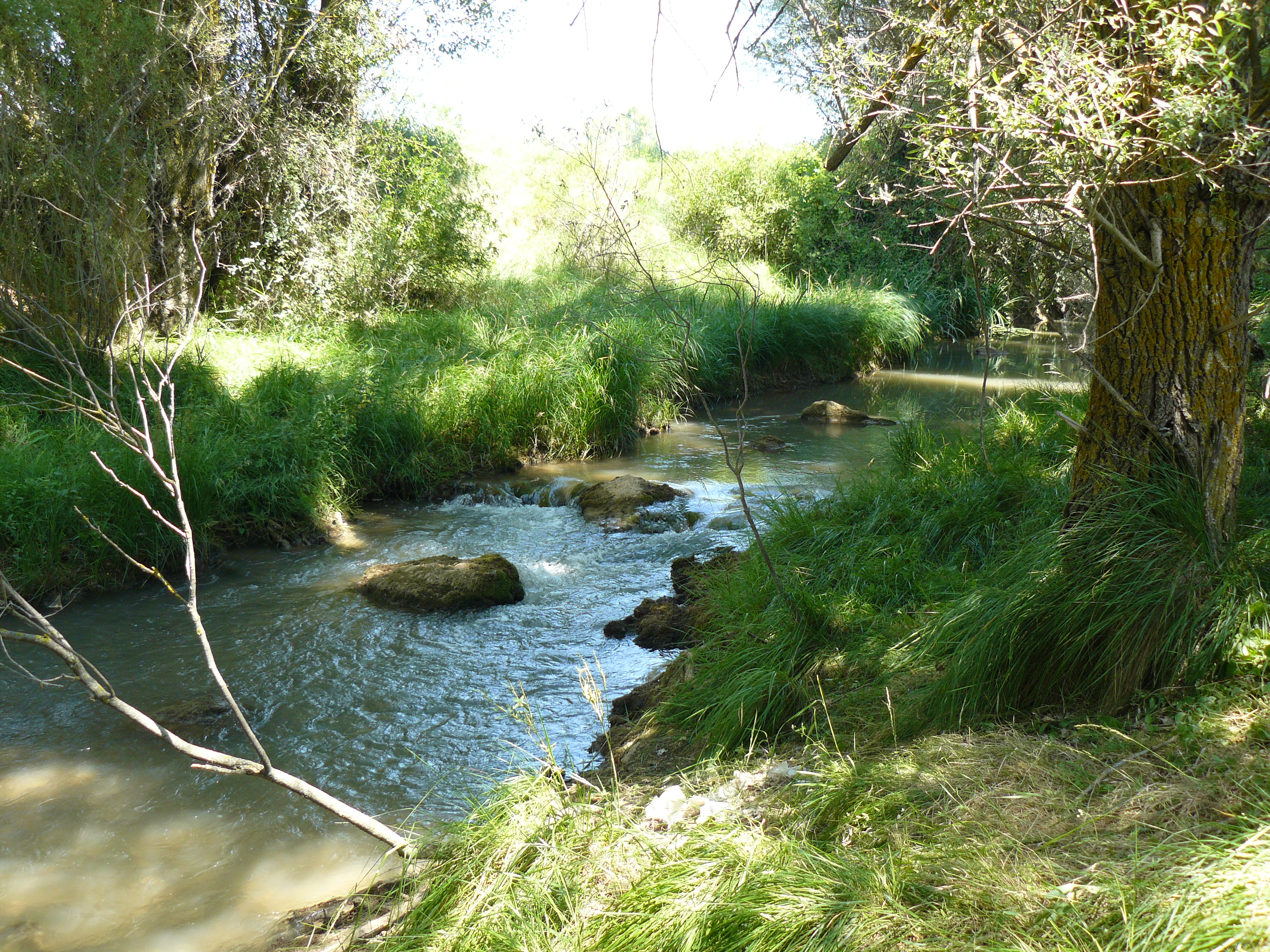 Arandilla, Burgos.